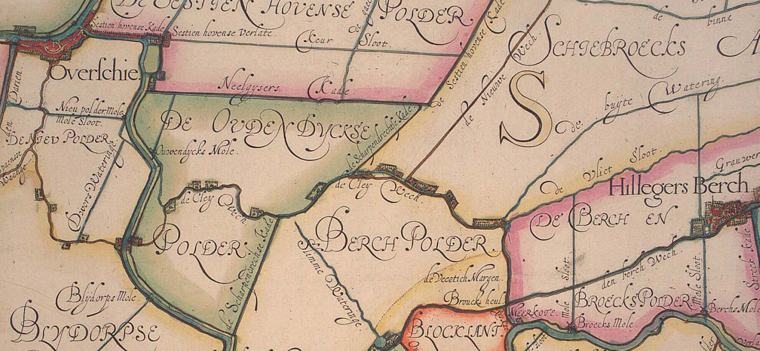 Detail uit de kaart van Schieland van 1611 van Floris Balthasarsz. van Berckenrode